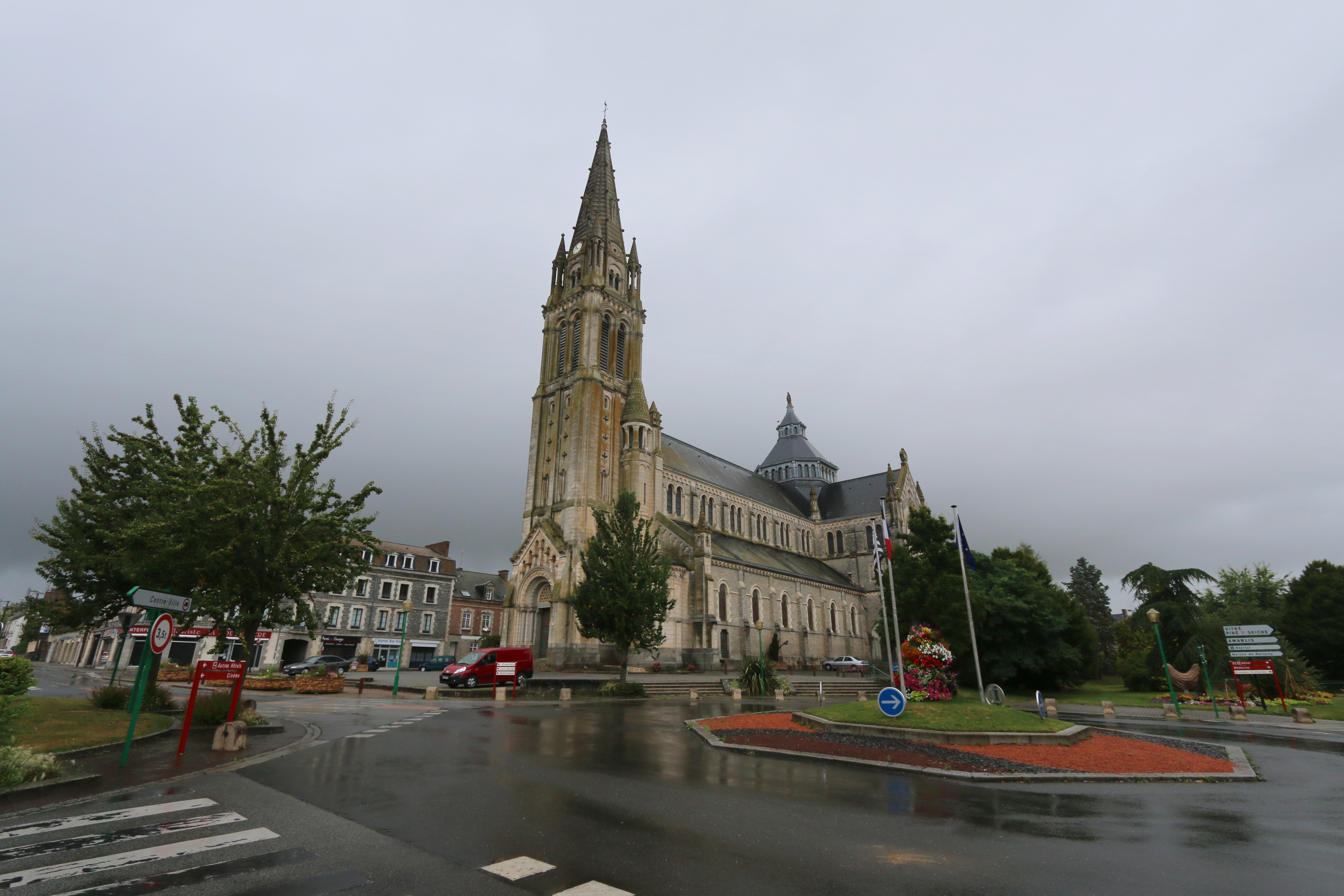 Eglise Saint-Martin de Janzé